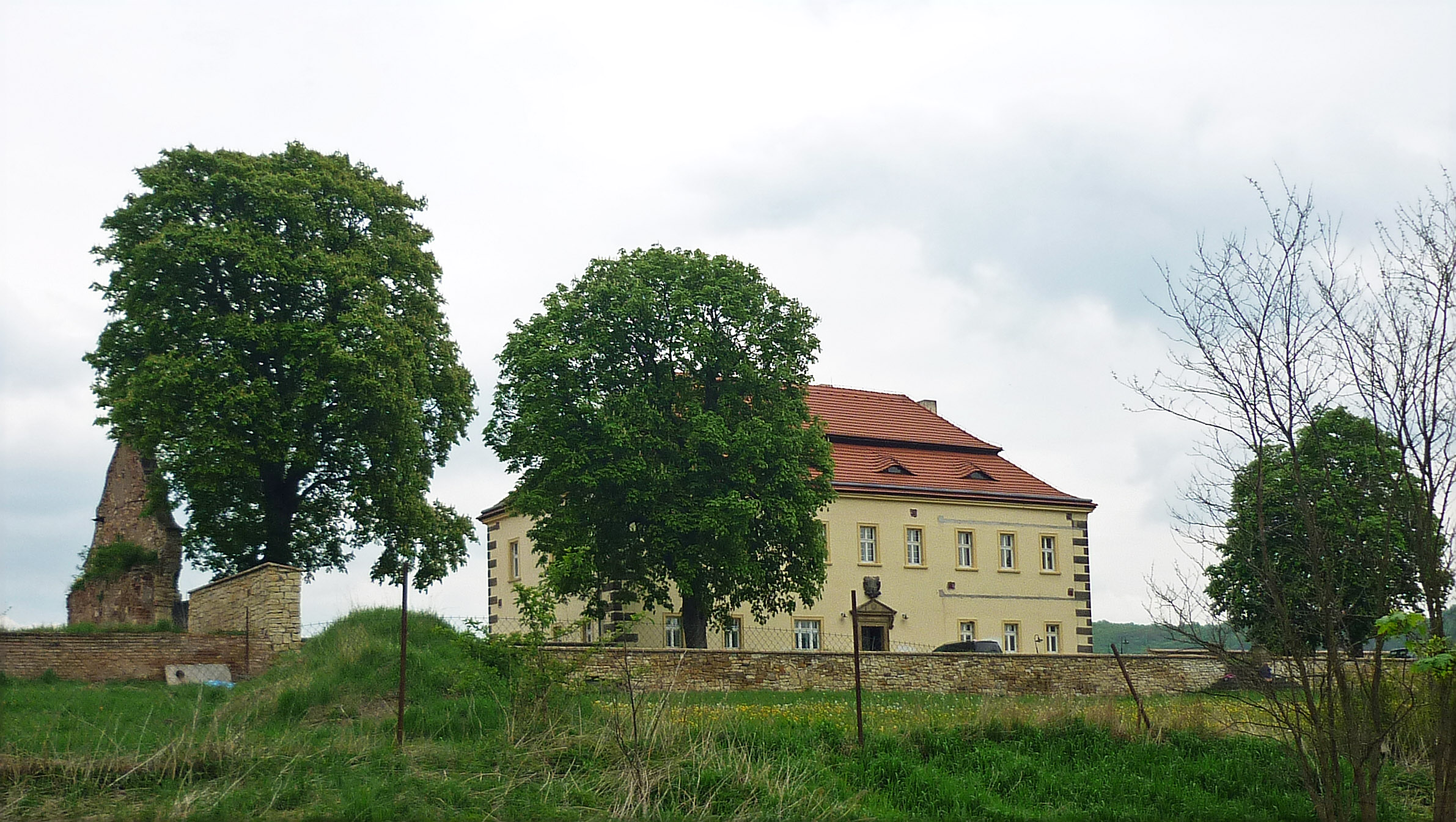 Schloss Libochowan (Libochovany) an der Elbe im Böhmischen Mittelgebirge